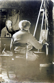 Charles Louis Gratia (1815-1911)